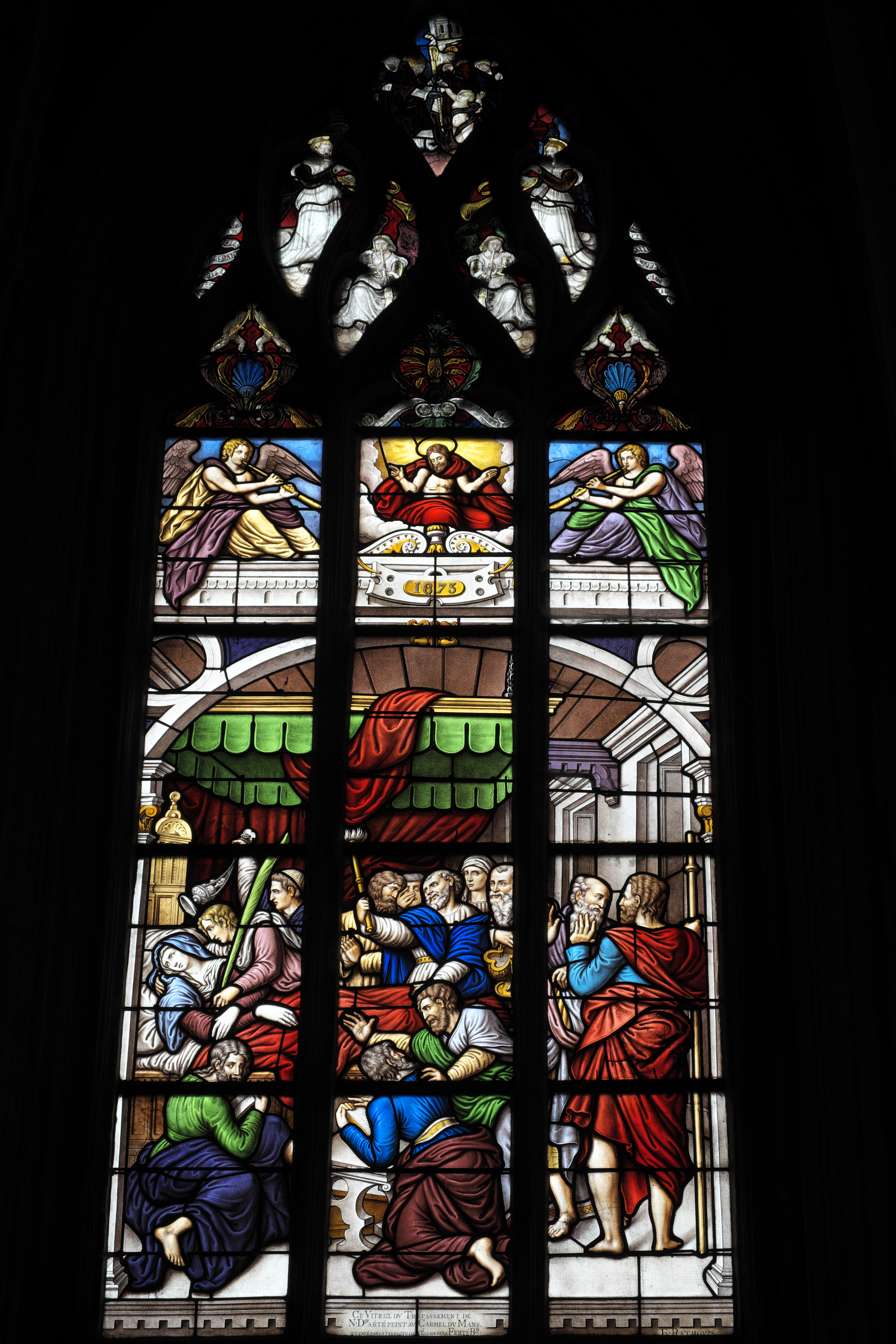 Katholische Pfarrkirche Notre-Dame-des-Marais in La Ferté-Bernard im Département Sarthe (Pays de la Loire/Frankreich), Bleiglasfenster (baie 3), mit Fragmenten aus der Zeit um 1533 von François Delalande im Maßwerk und im oberen Teil der Lanzetten, Lanzetten von 1873, von Édouard Rathouis, aus der Glasmalereiwerkstatt der Karmeliten von Le Mans (Carmel du Mans), mit Signatur: E. RATHOUIS; Darstellung: Marientod